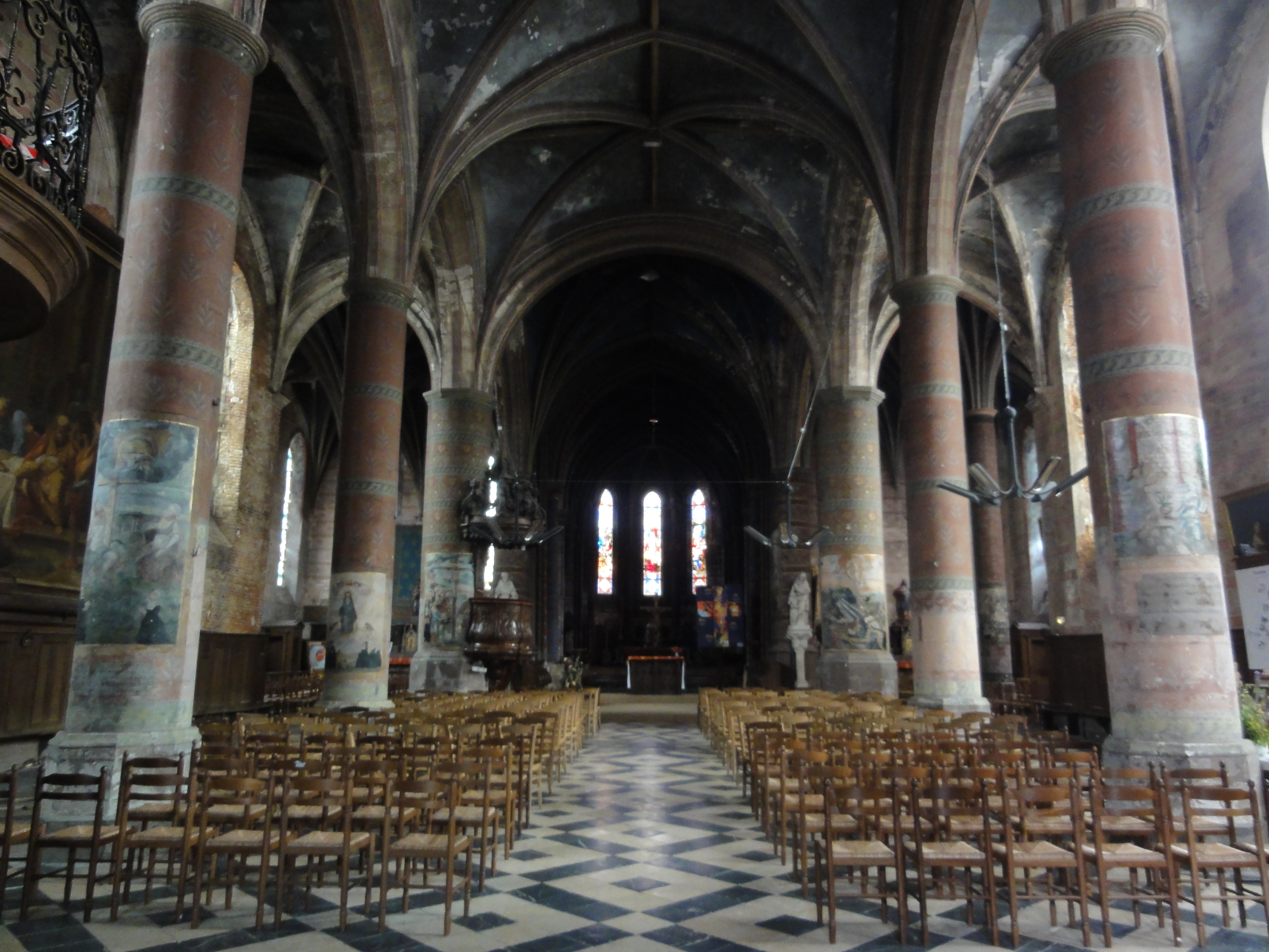 Vervins (Aisne) Église Notre-Dame, intérieur